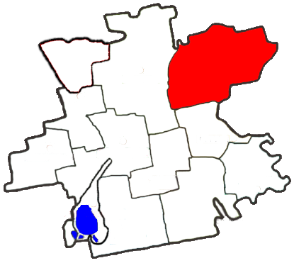 Кам'янська сільська рада (Апостолівський район)